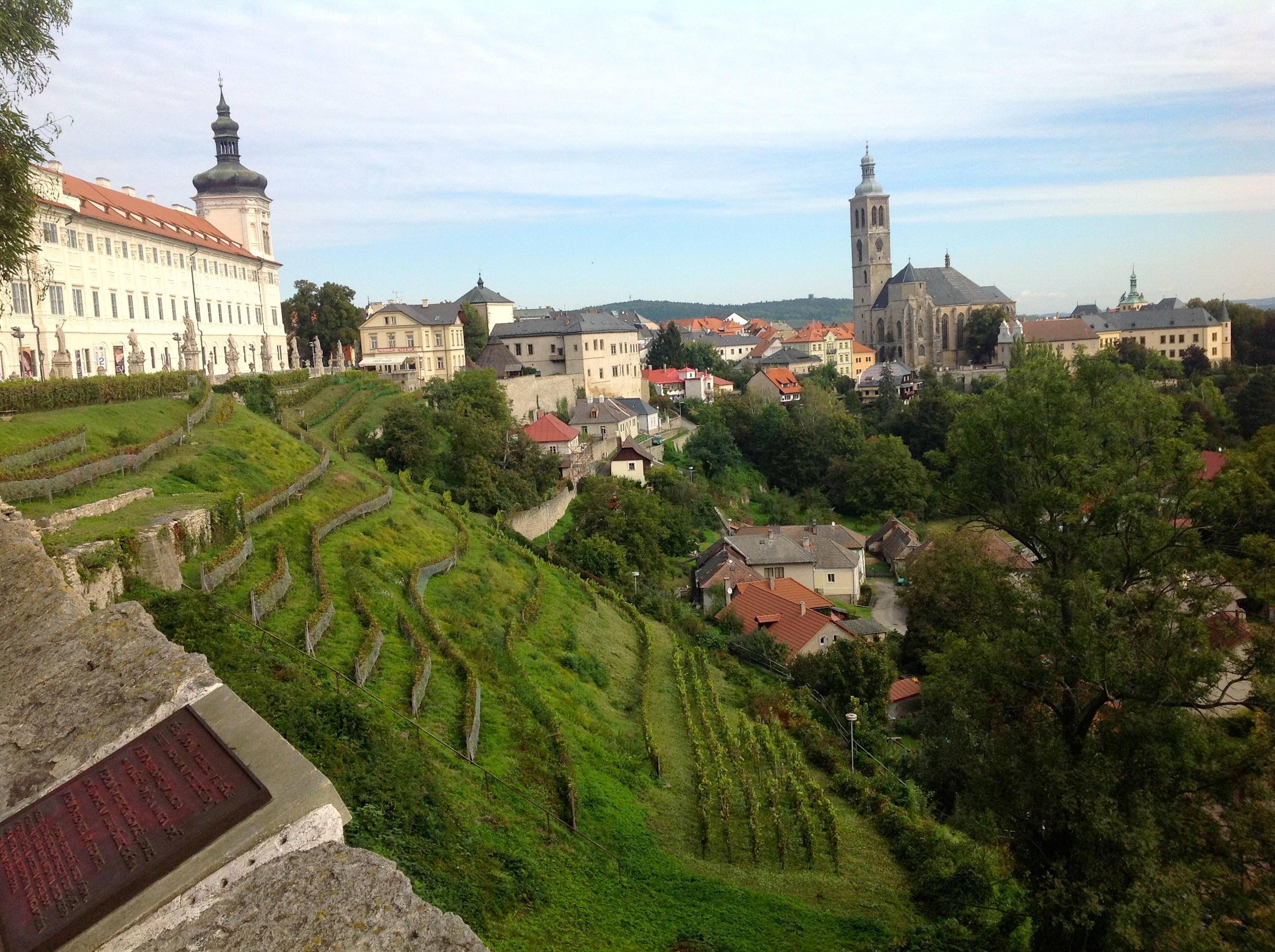 Kostel sv. Jakuba (Kutná Hora), u Vlašského dvora, Kutná Hora